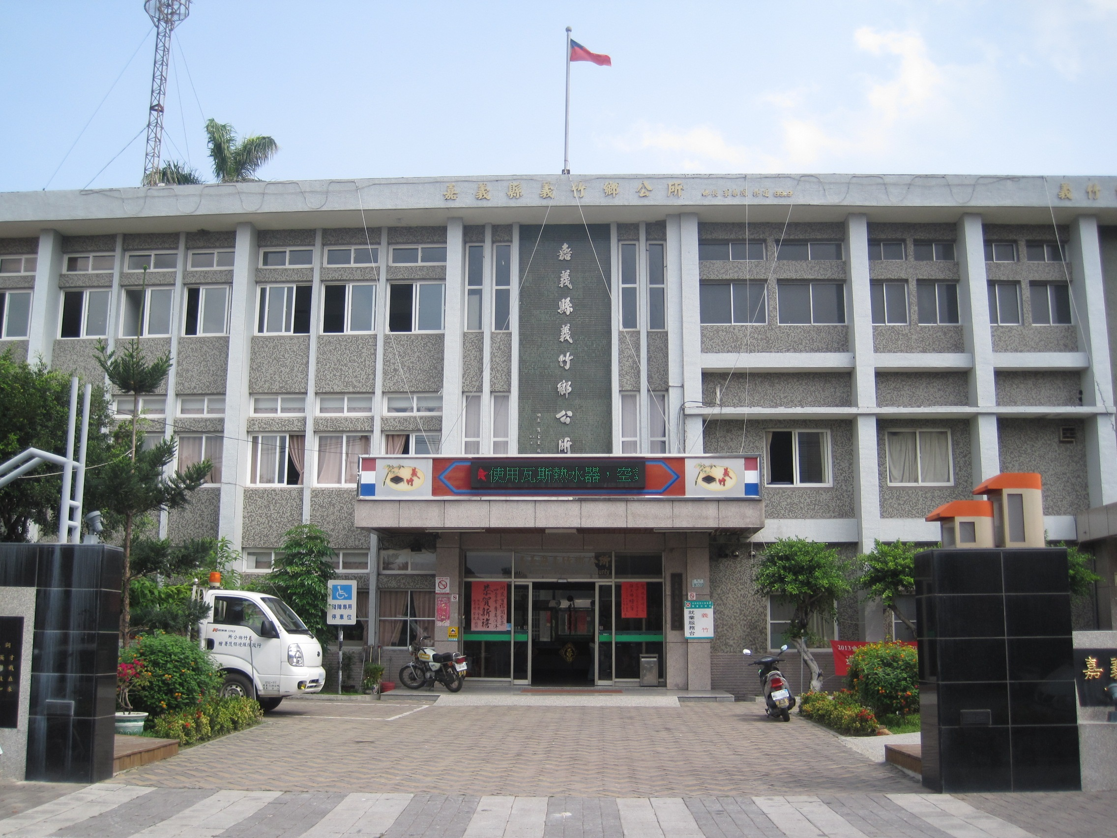 嘉義縣義竹鄉公所